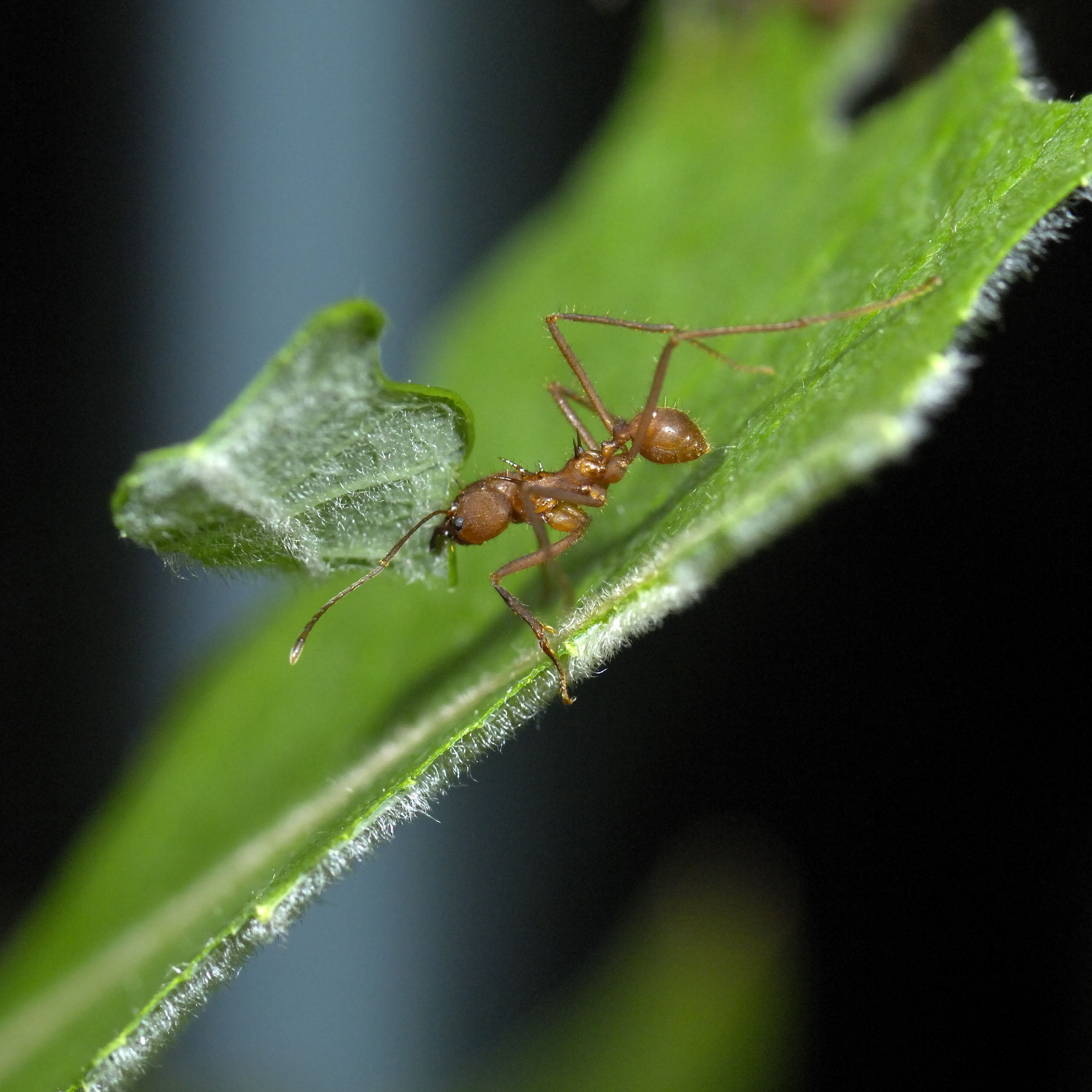 Blattschneiderameise (Atta columbica) im Tiergarten Schönbrunn